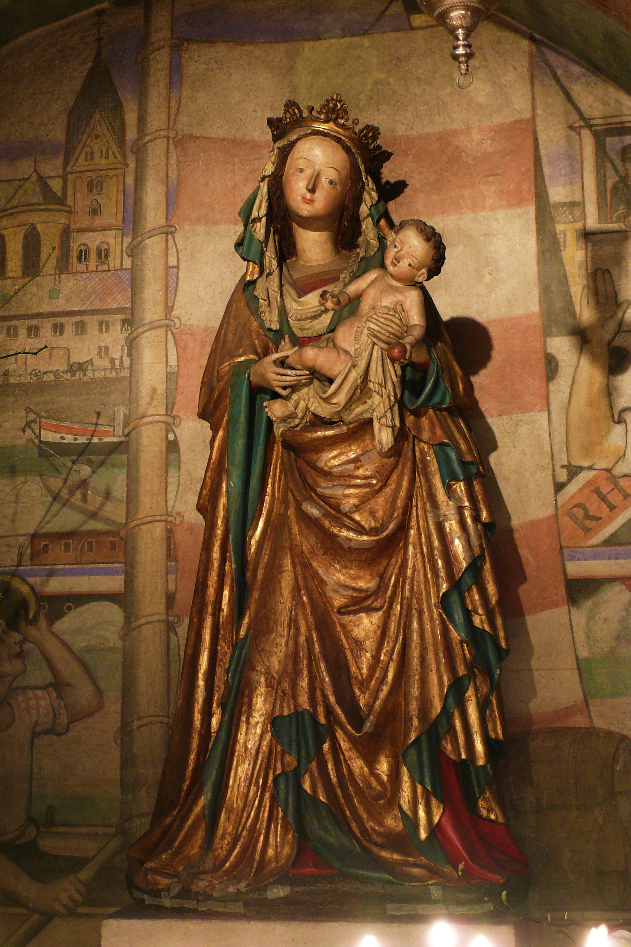 Die "Schiffermadonna" in der Kirche St.Maria Lyskirchen von Köln